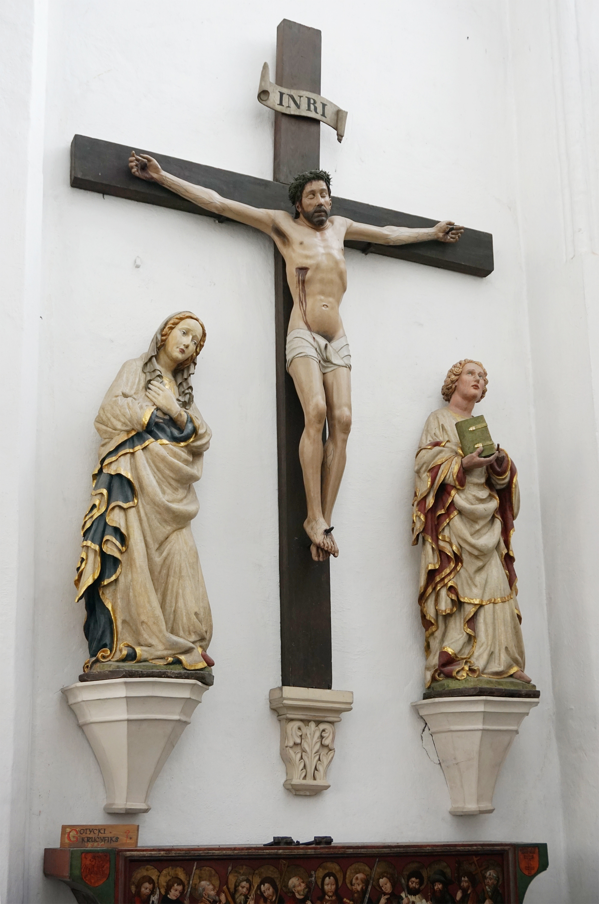 Grupa Ukrzyżowania w kaplicy Jedenastu Tysięcy Dziewic, ok. 1430 (data powstania figury Jezusa sporna)